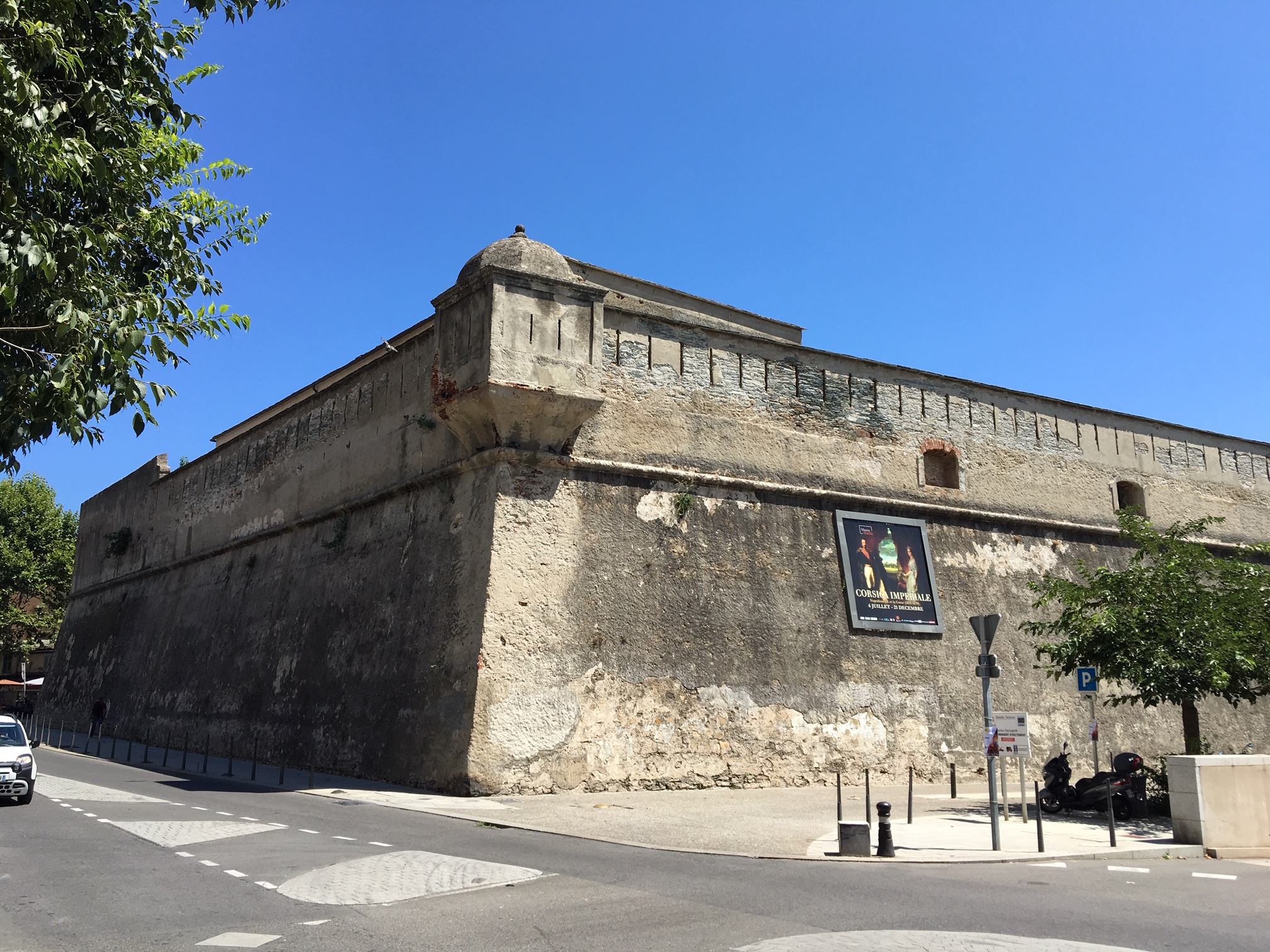 Le bastion San Ghjuvanni, en italien San Giovanni, construit par les génois. Citadelle de Bastia, Corse